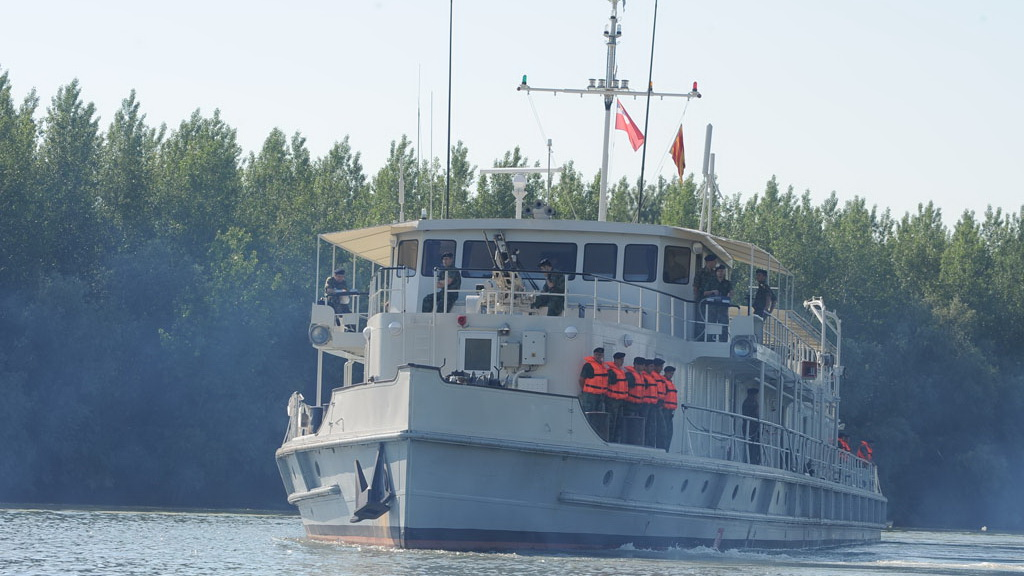 Корабль управления РПБ-30 «Козара» Речной флотилии Сербии